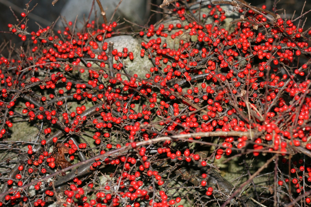 Owoce irgi